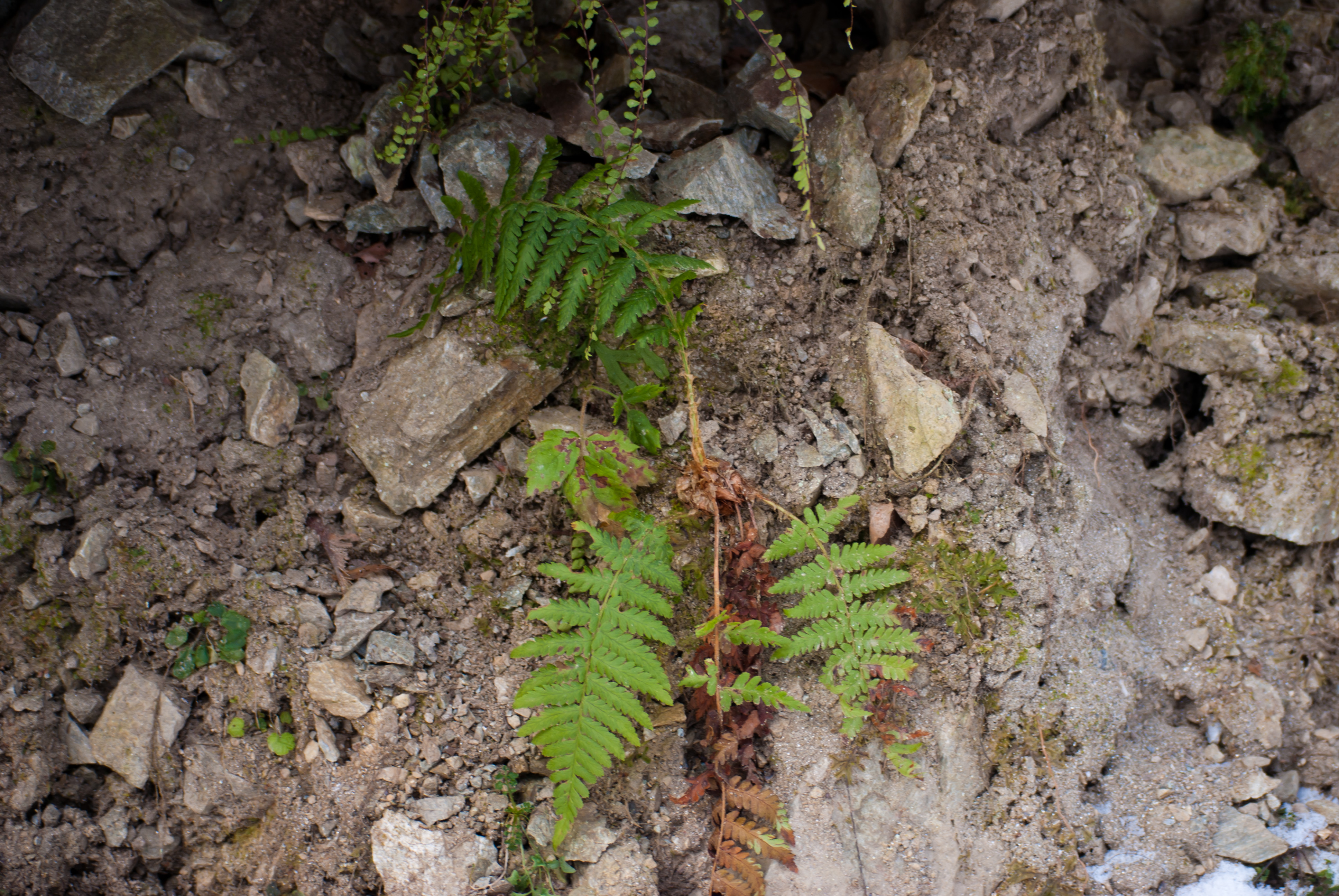 Щитник чоловічий (Dryopteris filix-mas). Мармароський масив Карпатського біосферного заповідника. Також зверху видно пагін аспленію волосовидного (Asplenium trichomanes).